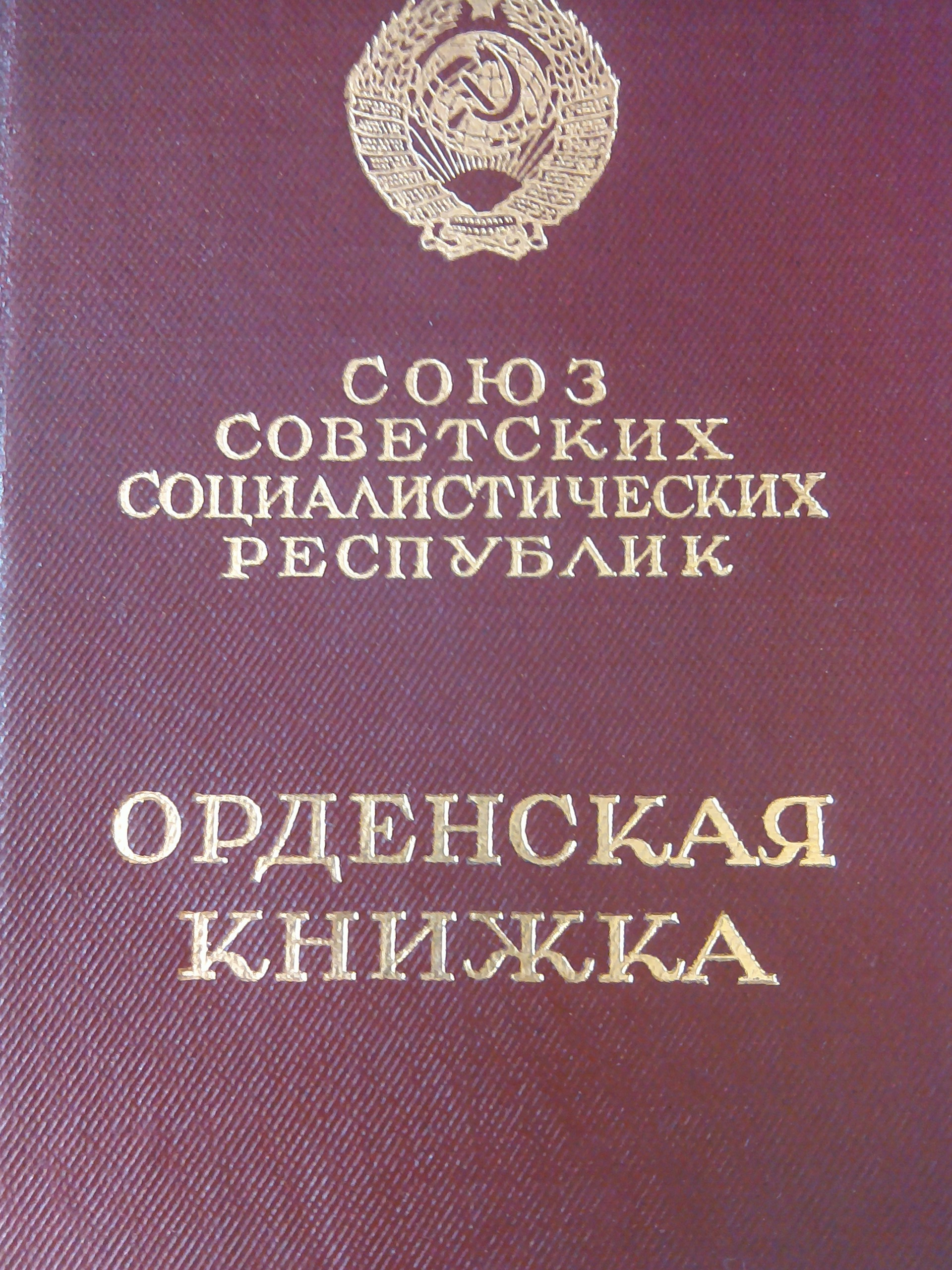 Орденська книжка